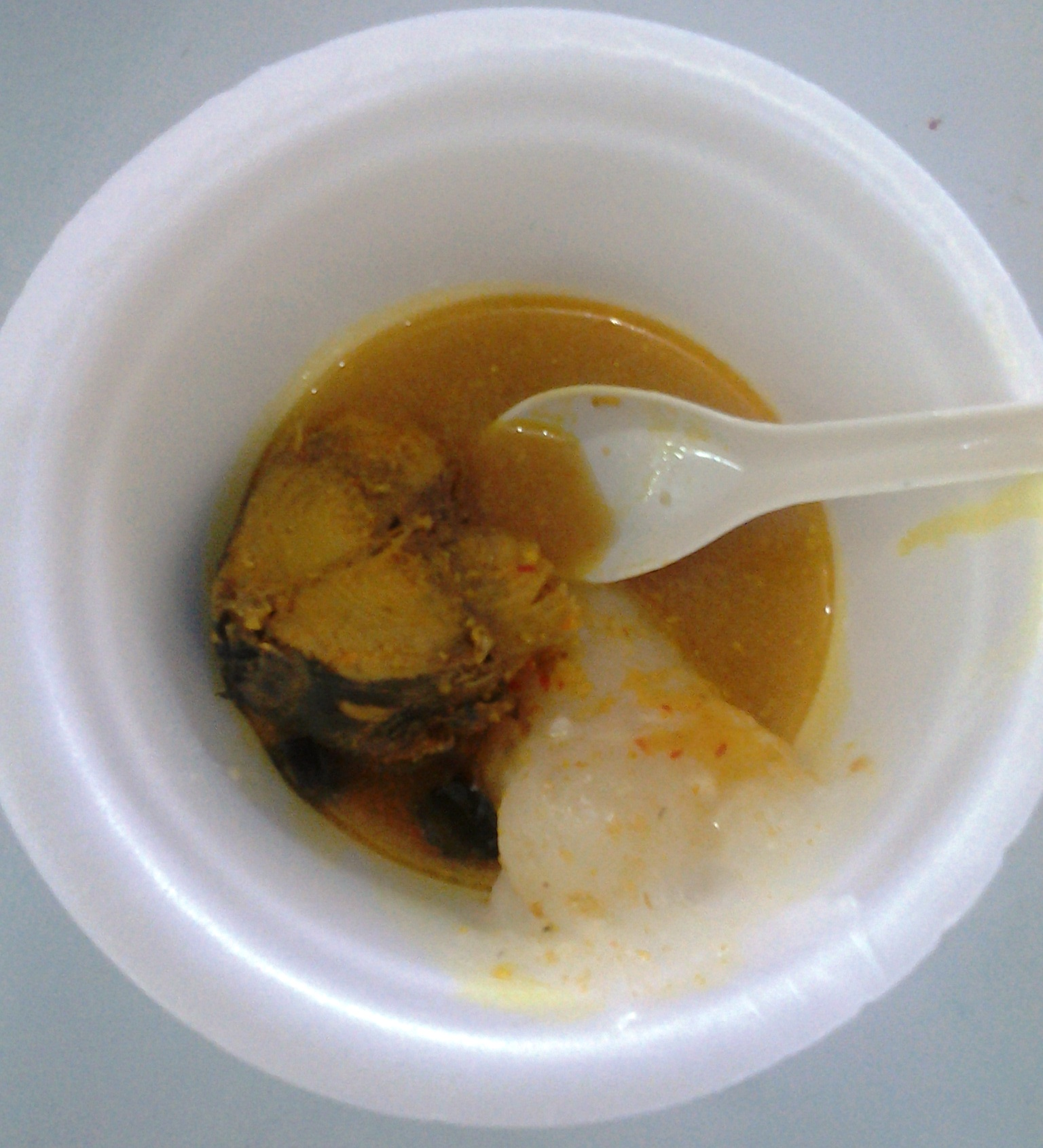 Papeda (makanan khas Maluku dan Papua, Indonesia) dan ikan kuah kuning.